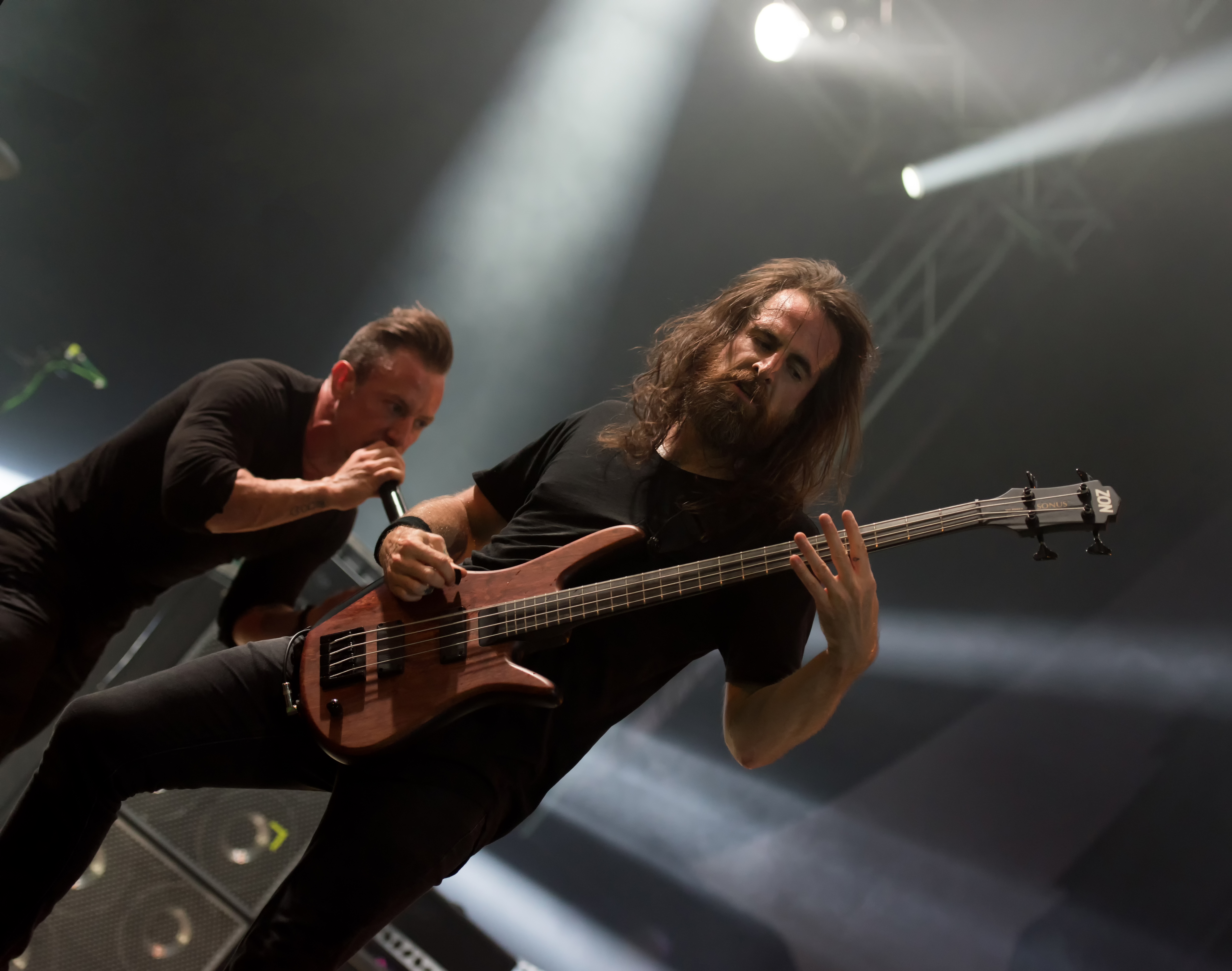 The Dillinger Escape Plan beim Wacken Open Air 2017